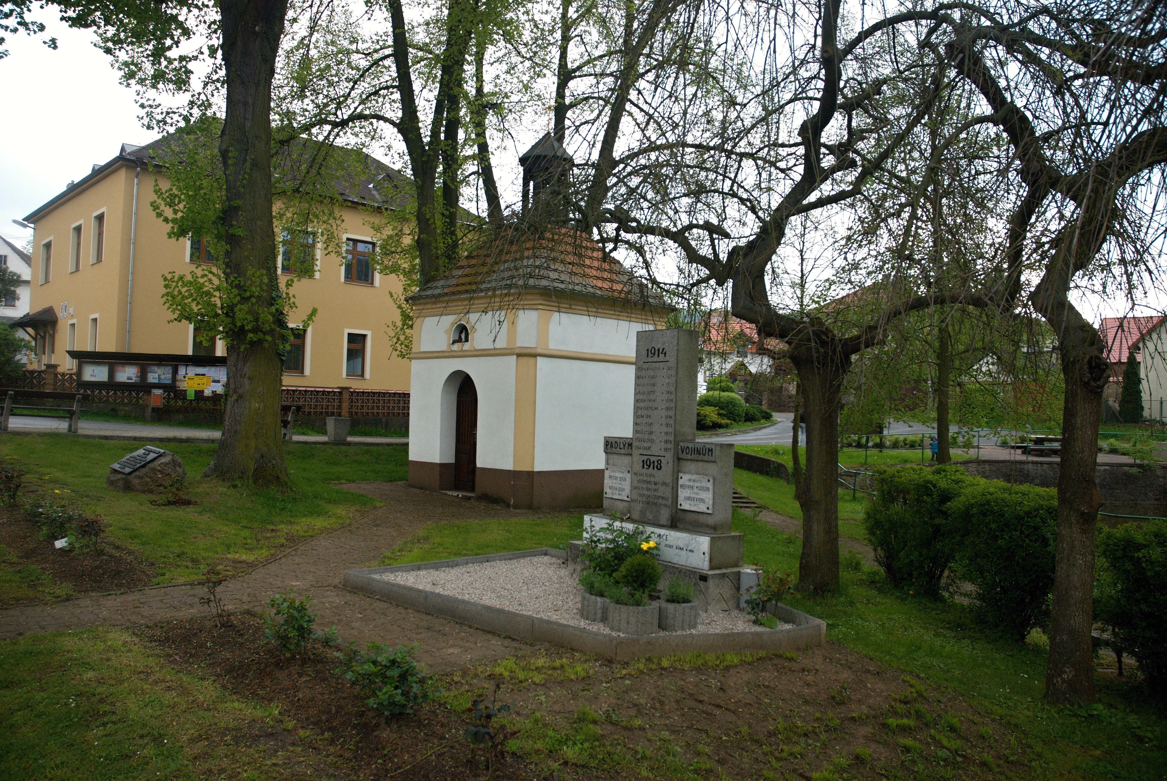 kaplička na návsi s pomníkem